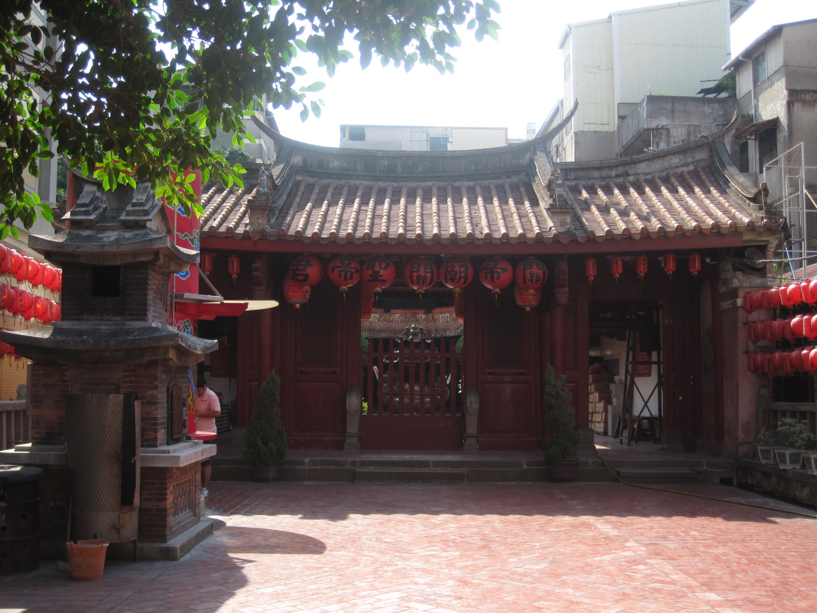 彰化關帝廟